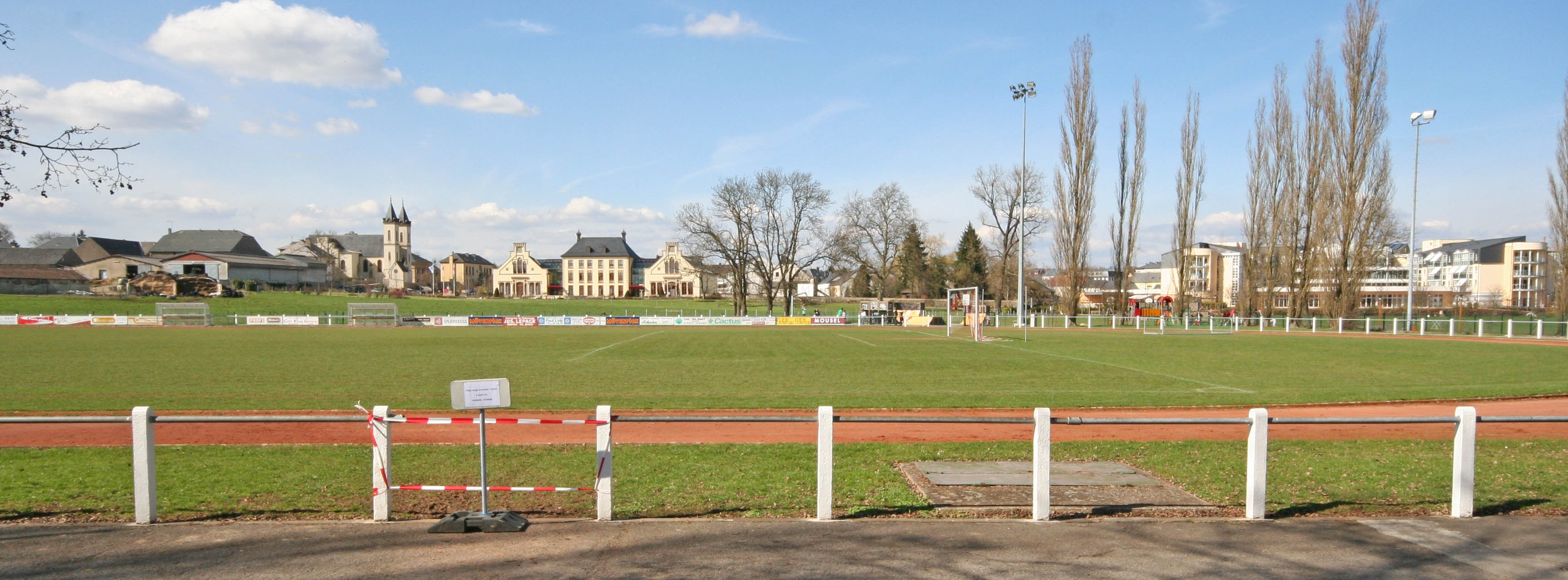 Terrain FC Mamer 32. Kategorie:Gemeng Mamer